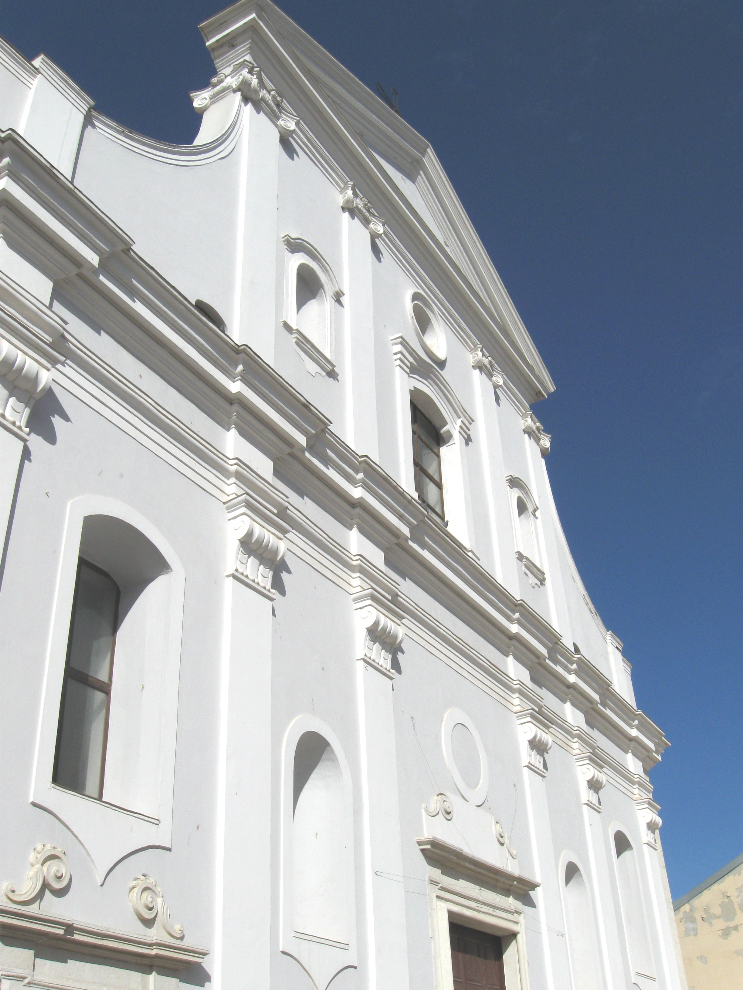 Facciata della Chiesa Madre di Rionero in Vulture, Basilicata